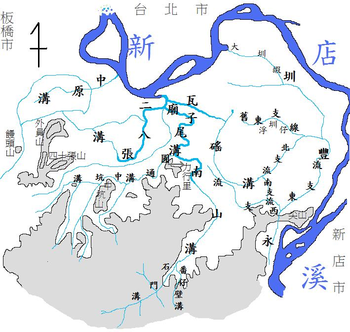 臺北縣中和鄉地形圖（中和鄉志）。